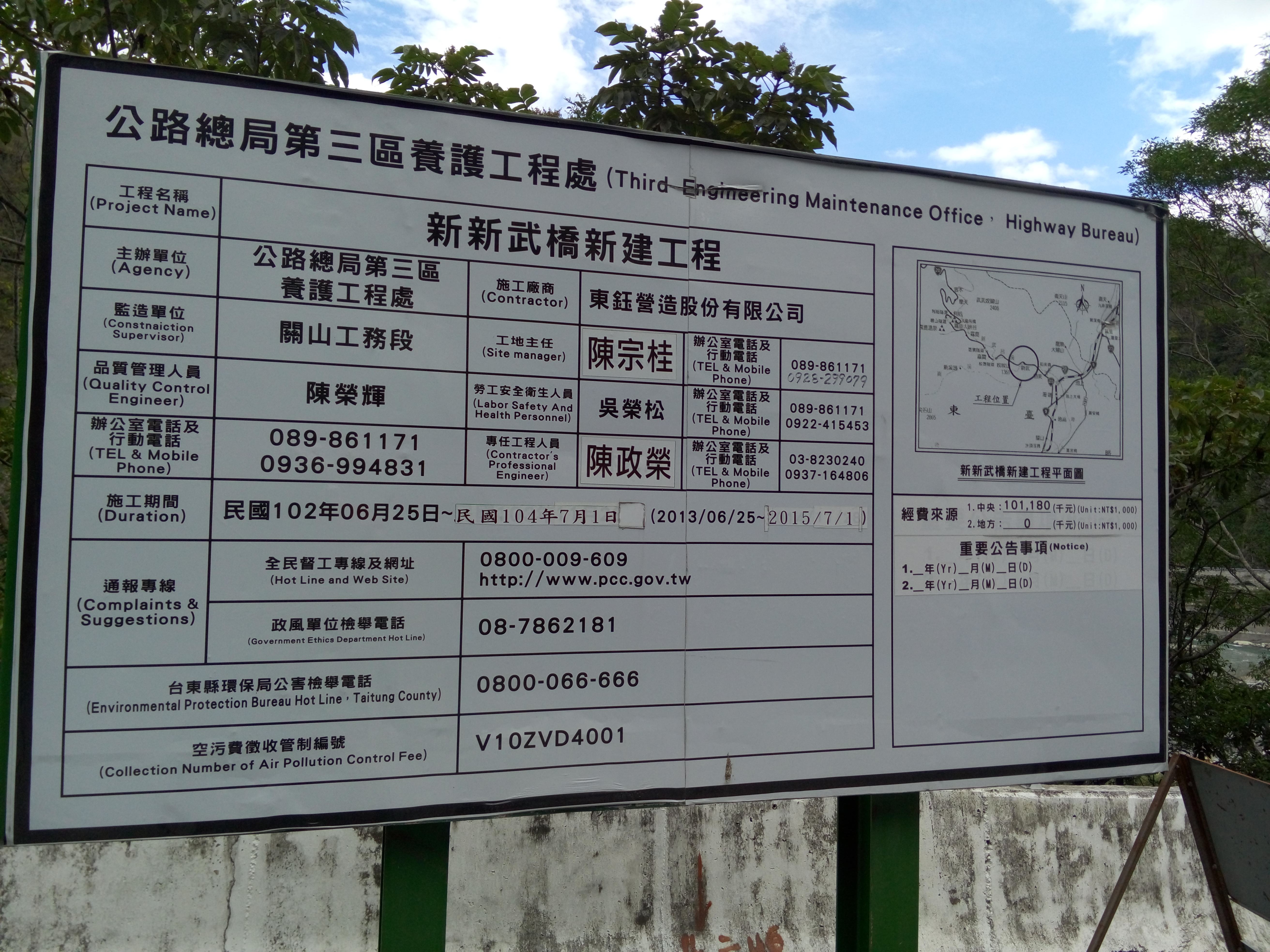 臺灣臺東縣海端鄉南橫公路新武橋